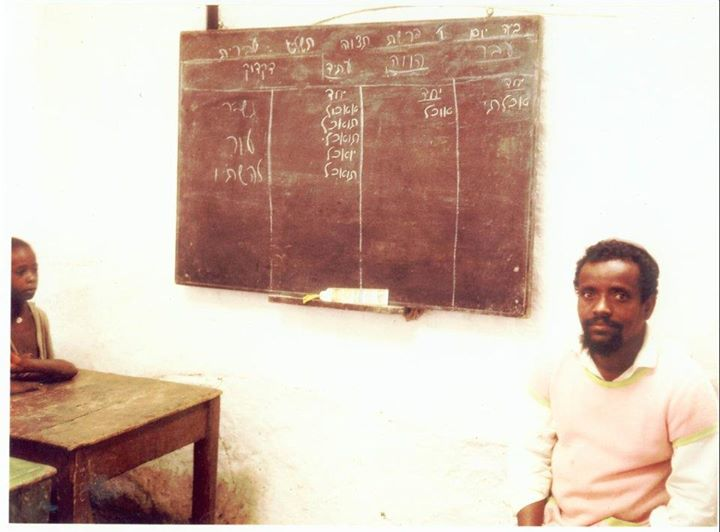 אבבה ברהן (יאיר בן אורי) היה איש דת ואיש חינוך יהודי במחוז גונדר שבאתיופיה, אסיר ציון, פעיל עלייה מרכזי ומראשי יוצאי אתיופיה באשדוד. צולמה בכפר וולקה